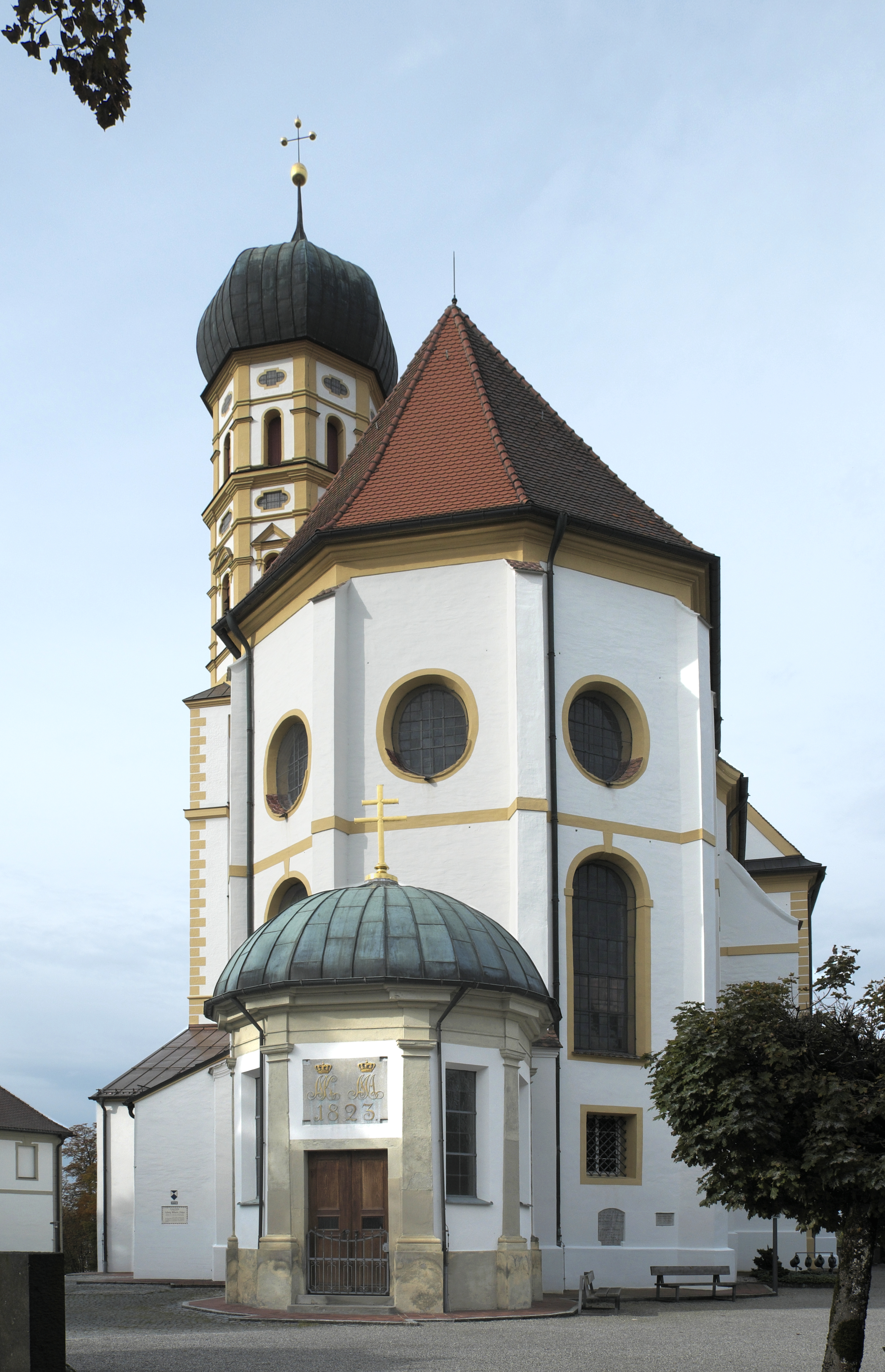 Katholische Pfarrkirche St. Martin in Marktoberdorf im Landkreis Ostallgäu (Bayern/Deutschland)